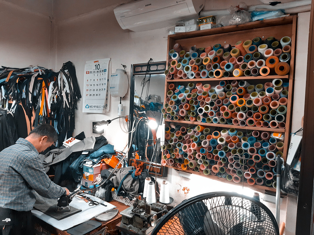 충남 아산의 전통시장내의 전문 수선집